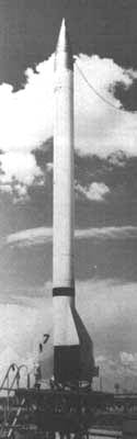 Image d'un lanceur Viking I du Programme Vanguard. Cette image provient du site